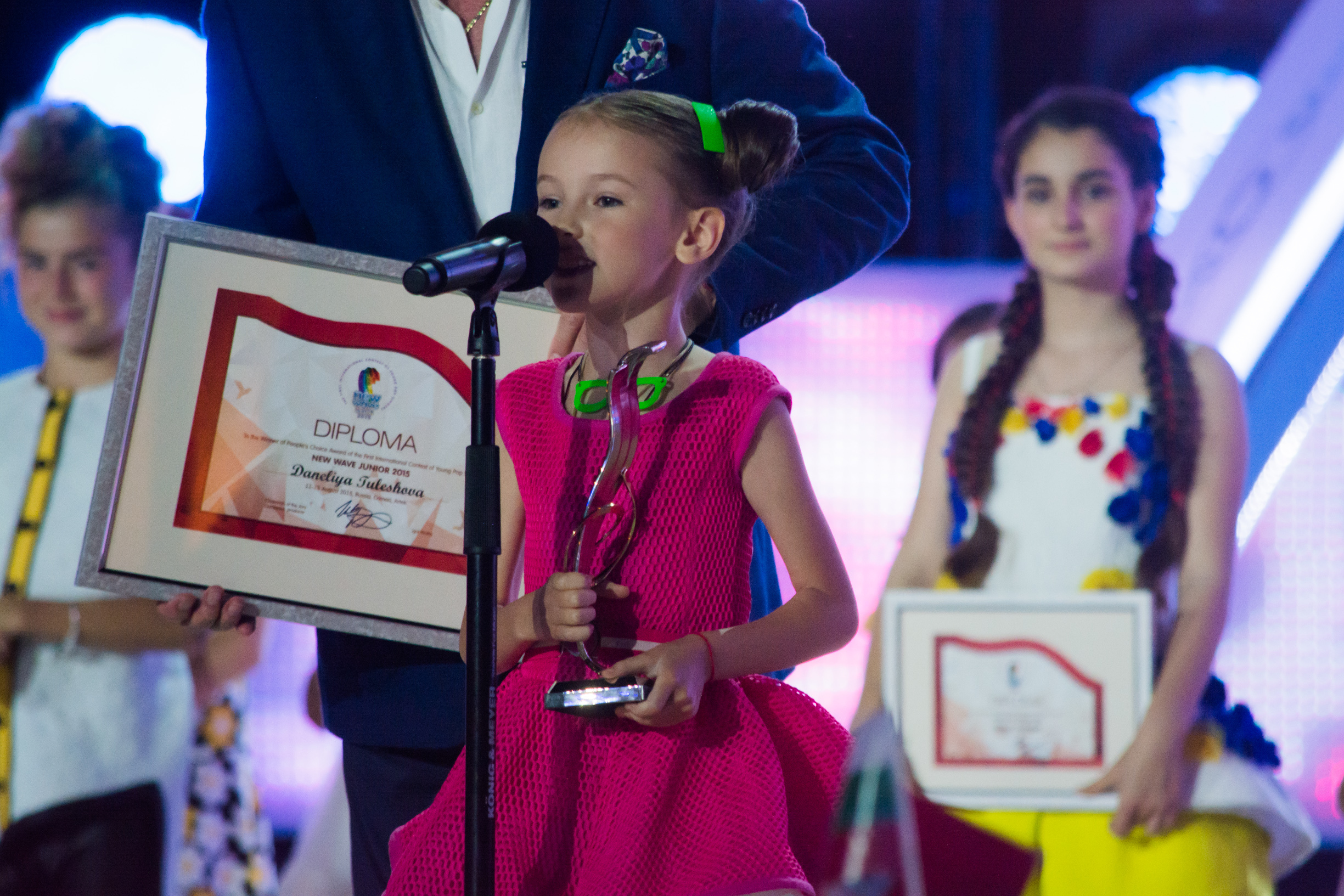 Данэлия Тулешова на Детской Новой волне 2015